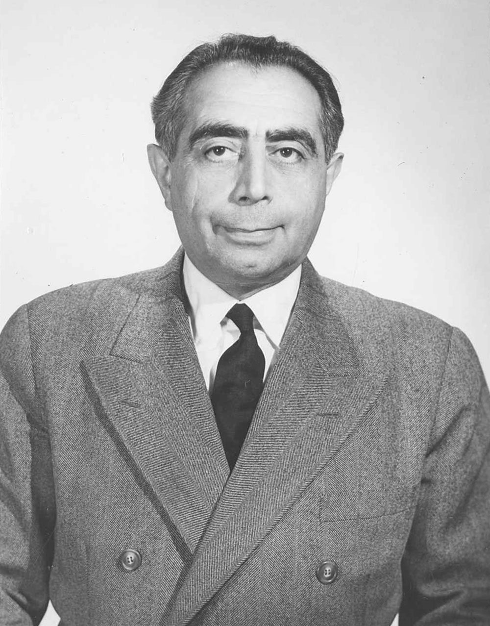 علی امینی؛ سی و نهمین نخست وزیر ایران